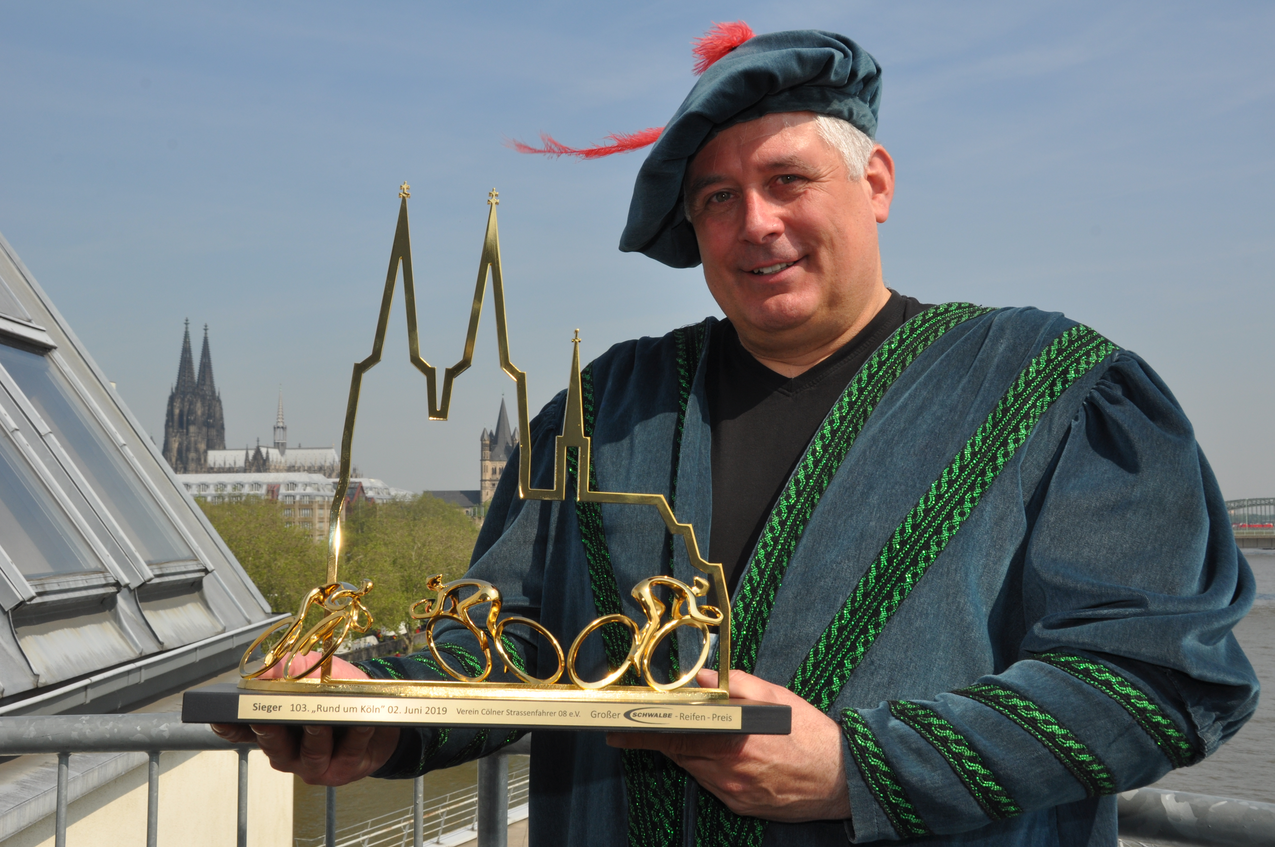 Markus Wißkirchen alias "Graf von Berg" mit Siegertrophäe